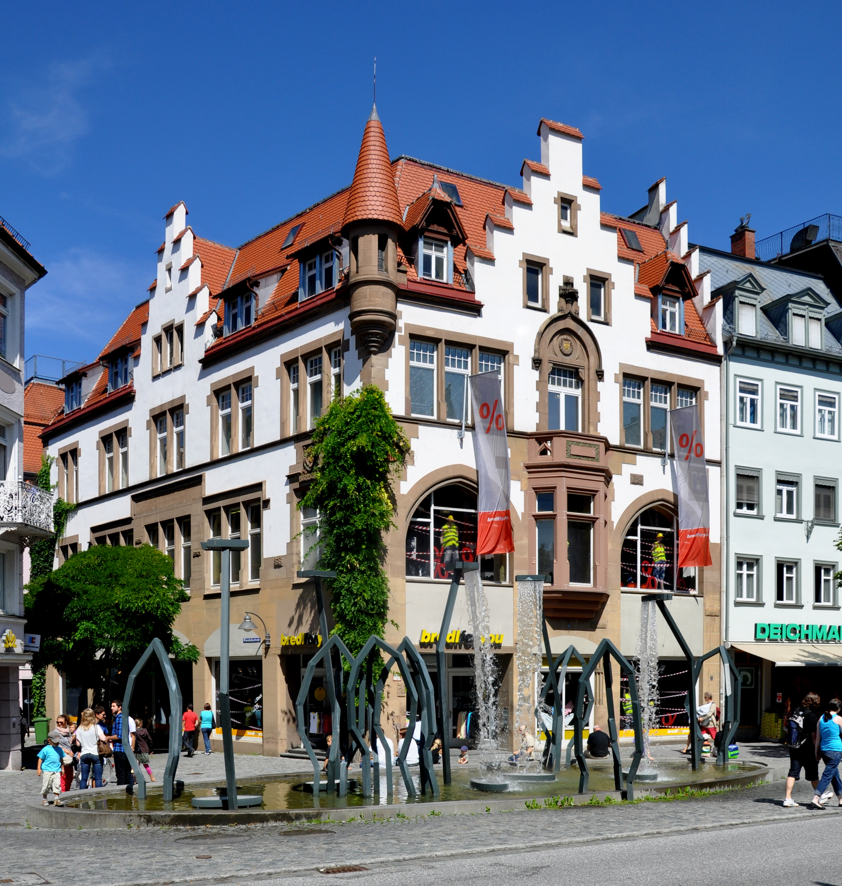 Ravensburg, ehemaliges Kaufhaus Knopf, heute Boutique „You Cult“, Marienplatz 55